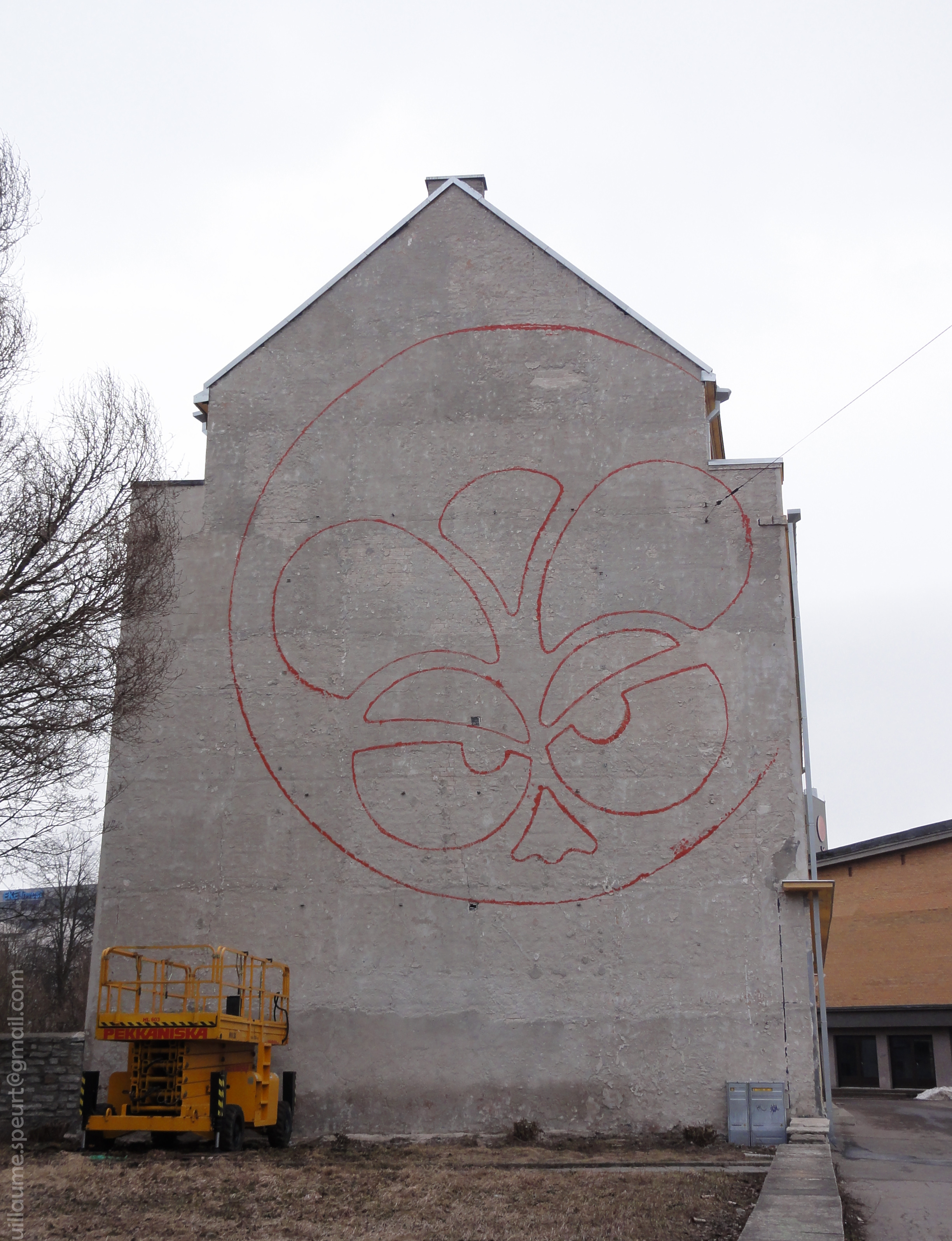 Pärnu mnt 43, Tallinn